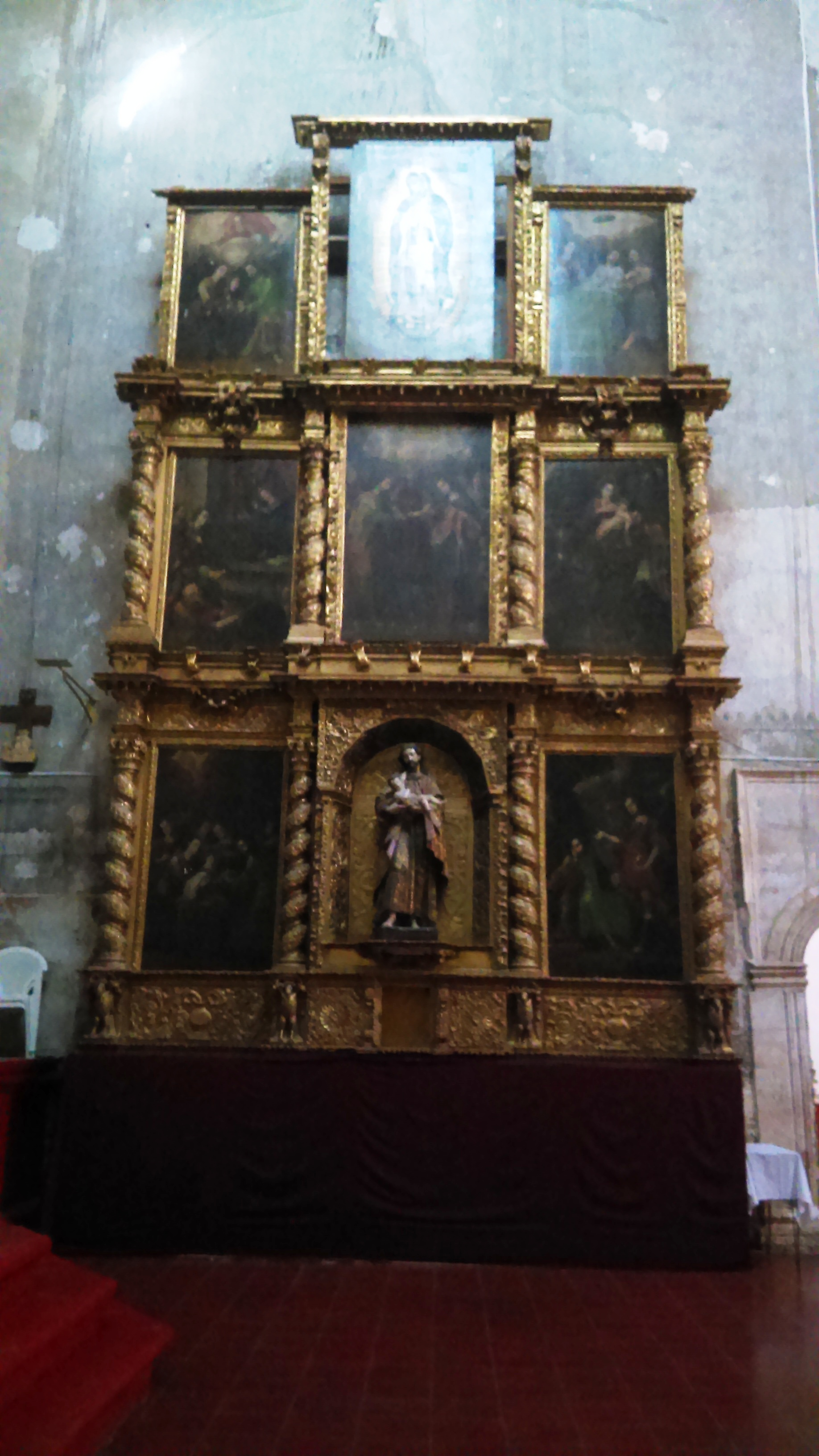 Templo y exconvento de los Santos Reyes, Metztitlán.